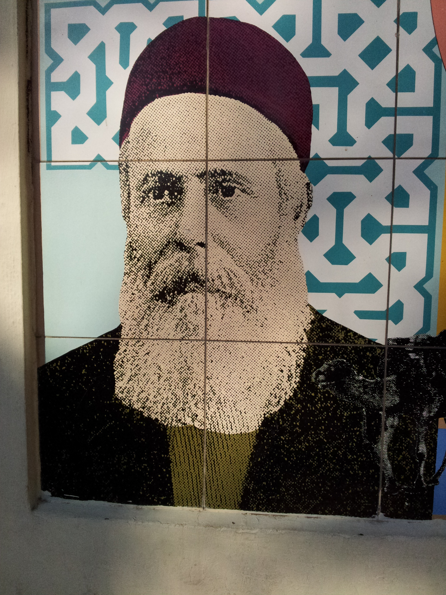 דיוקנו של אהרן שלוש. פרט במיצג "תוצרת הארץ" של דוד טרטקובר בשכונת נווה צדק בתל אביב